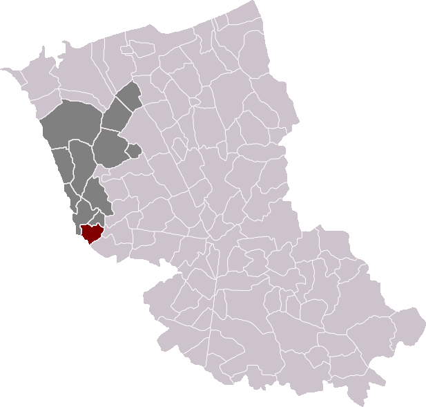 Locatie gemeente Sint-Momelijn in arrondissement Duinkerke. Zelfgemaakt. Location of Saint-Momelin municipality in the arrondissement of Dunkirk. Self made. Localisation de la commune de Saint-Momelin dans l'arrondissement de Dunkerque. Fait moi-même.